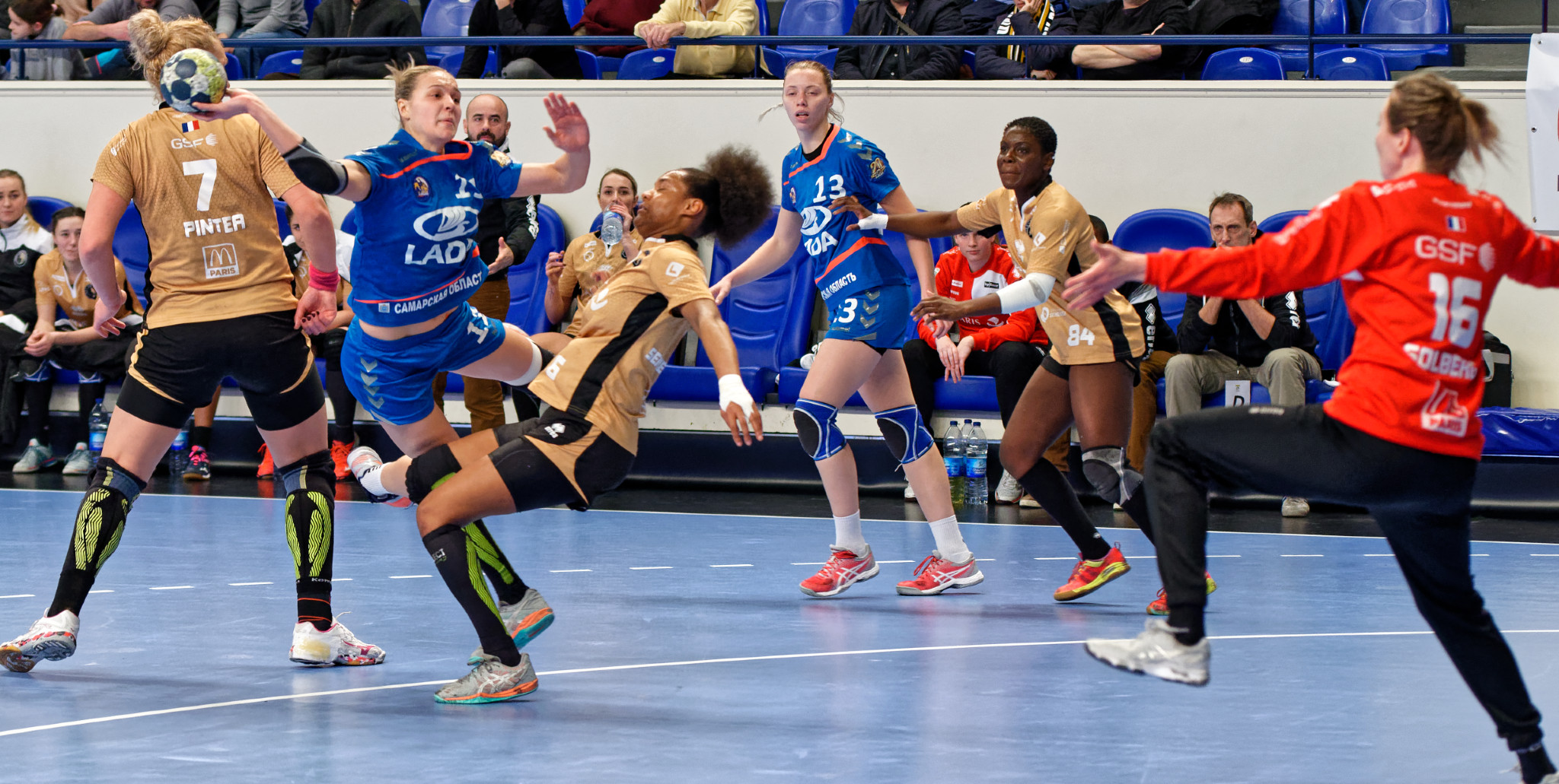 Match de coupe EHF entre Issy Paris Hand et les russes de Lada Togliatti. A Coubertin, le 12 janvier 2018.